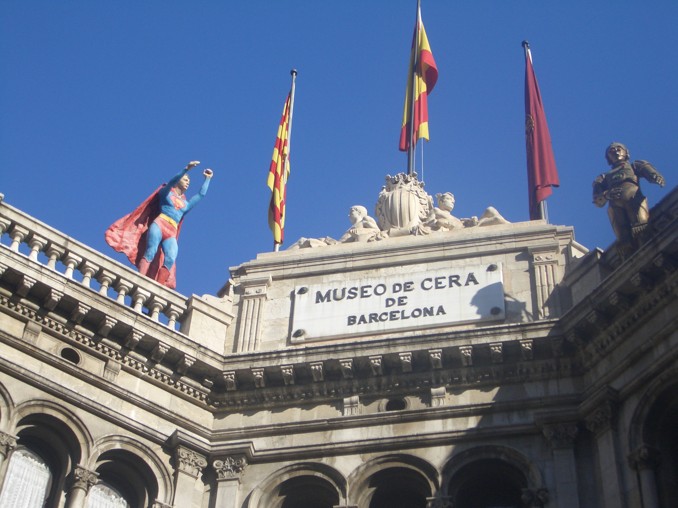 Figuras del tejadodel Museo de Cera de Barcelona, España.